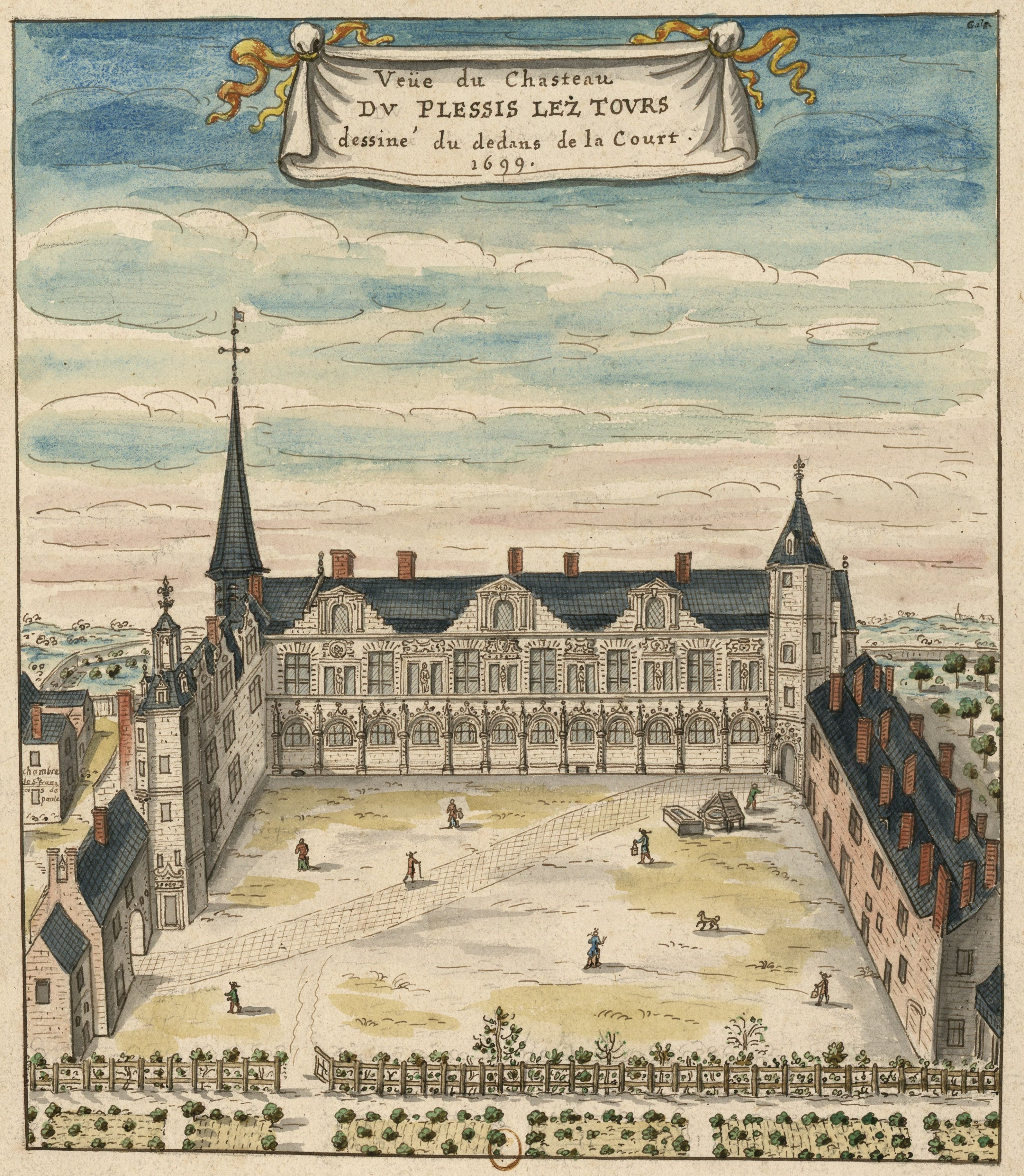 Schloss Plessis-lès-Tours, Hofansicht